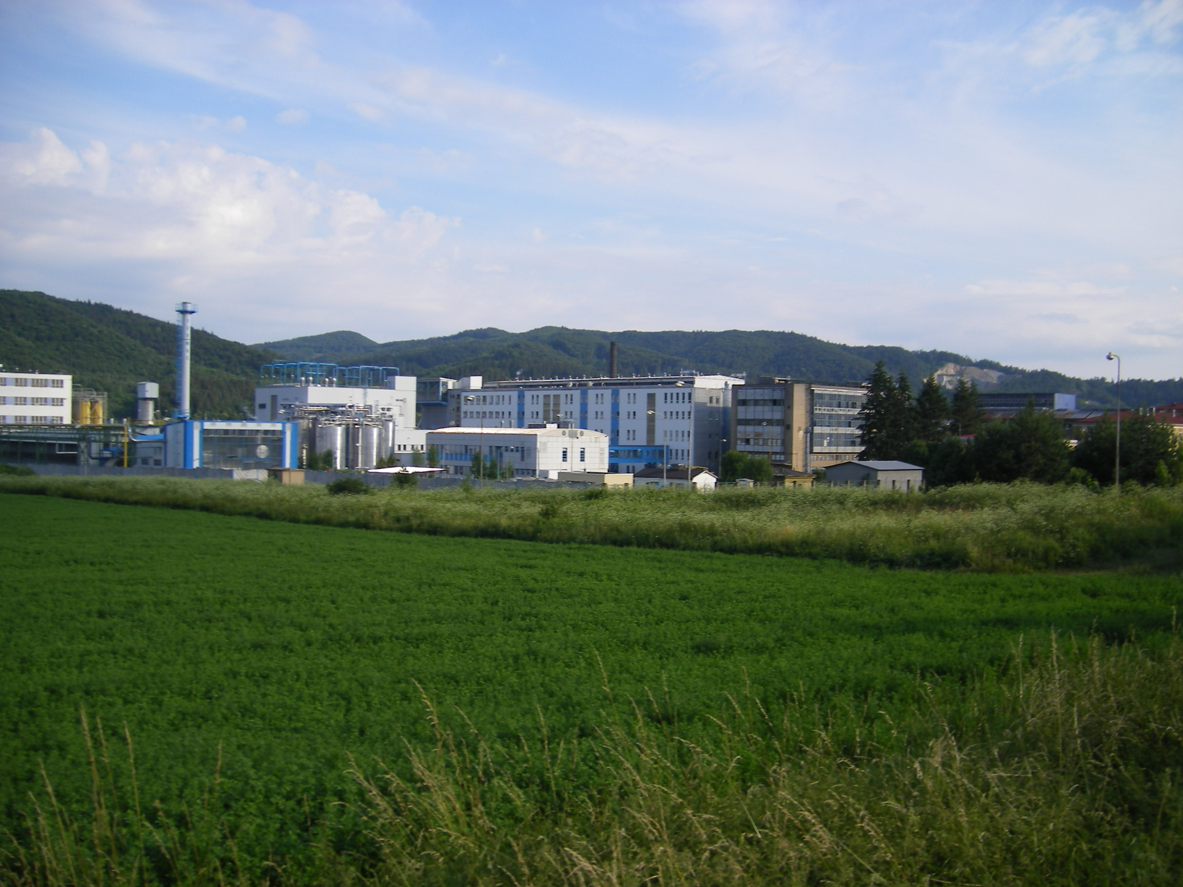 Slovenská Ľupča (okres Banská Bystrica), závod Fermas